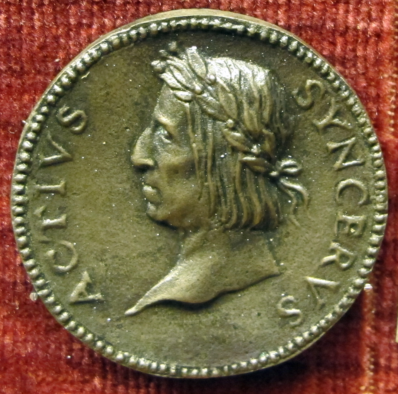 Medaglia di Jacopo Sannazaro (1457-1530), recto